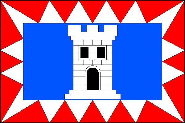 Vlajka obce Deblín